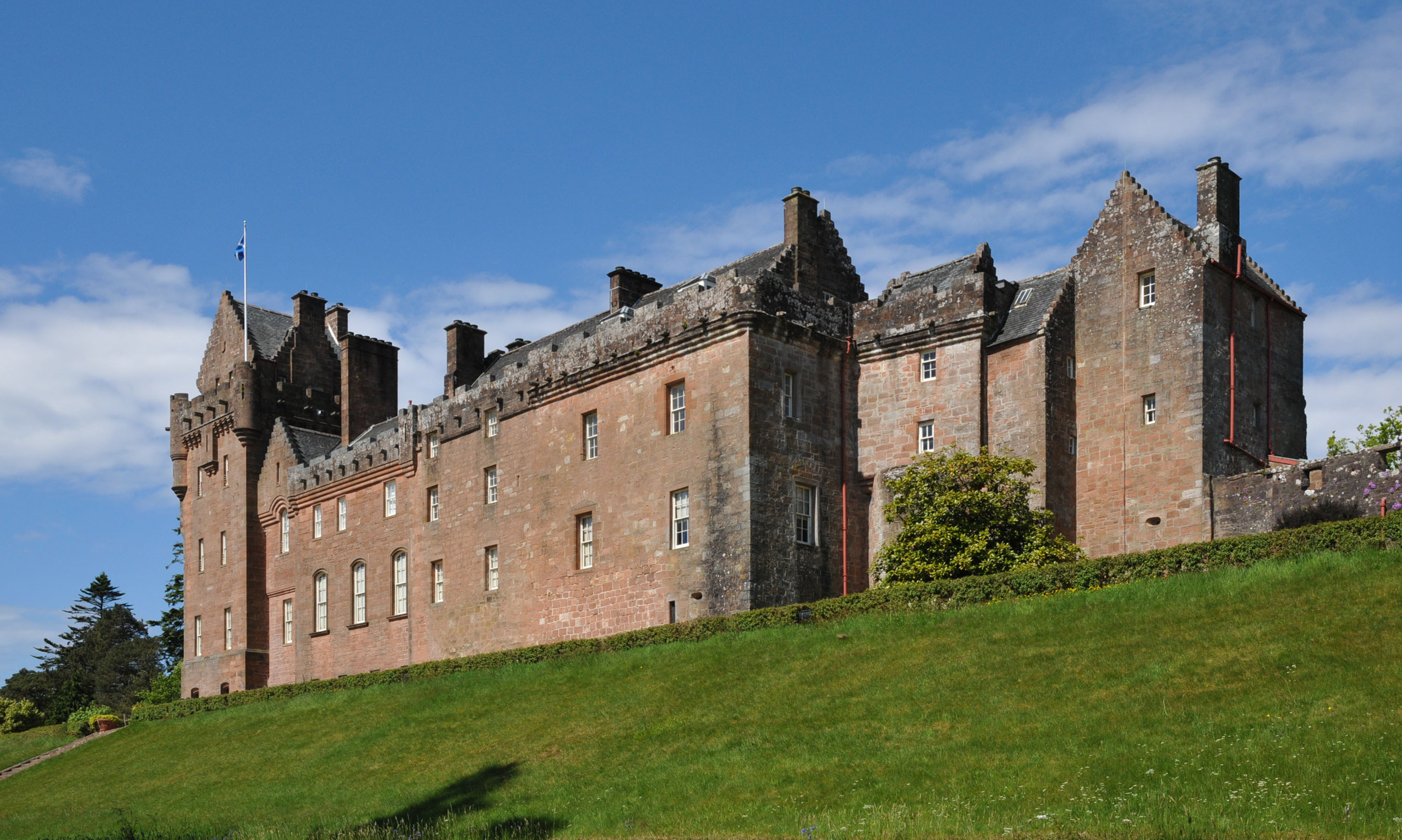 Brodick Castle auf Arran, Ansicht von Südosten